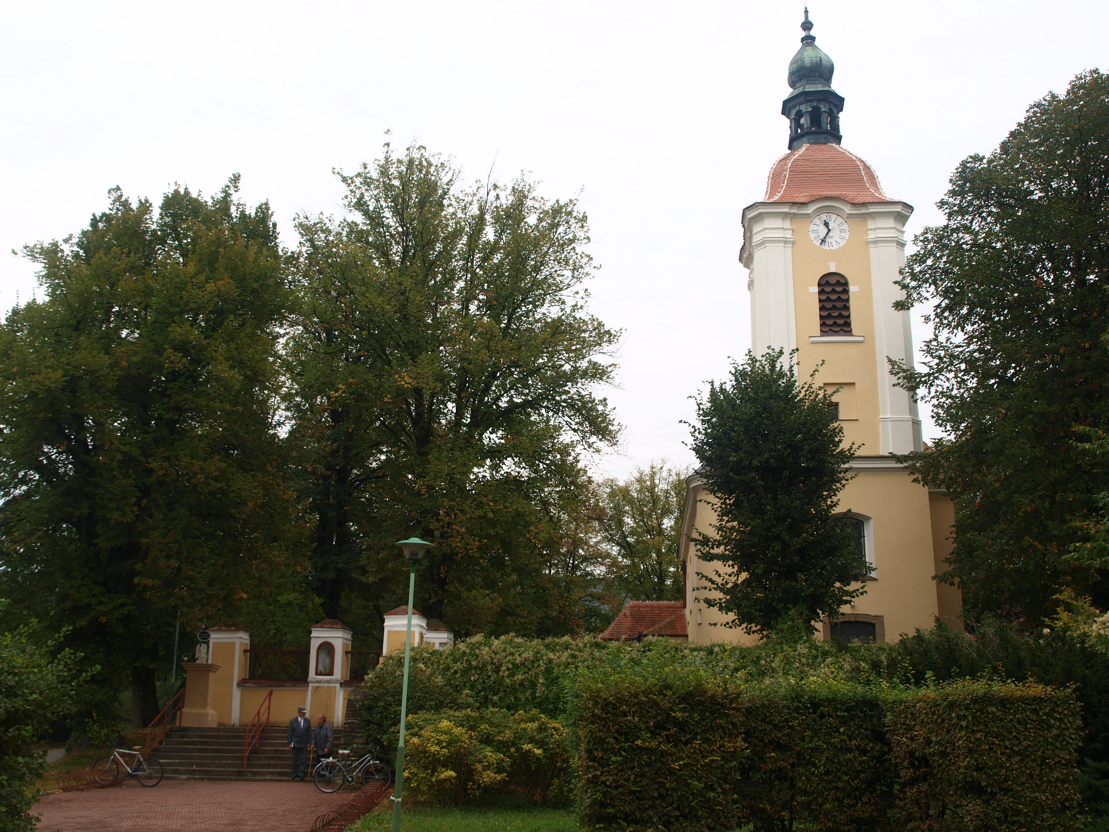 Velká nad Veličkou, kostel sv. Maří Magdalény - po mši